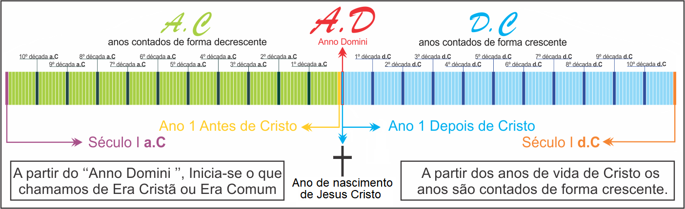 Linha do tempo construída sobre o modo cronológico "Anno Domini".